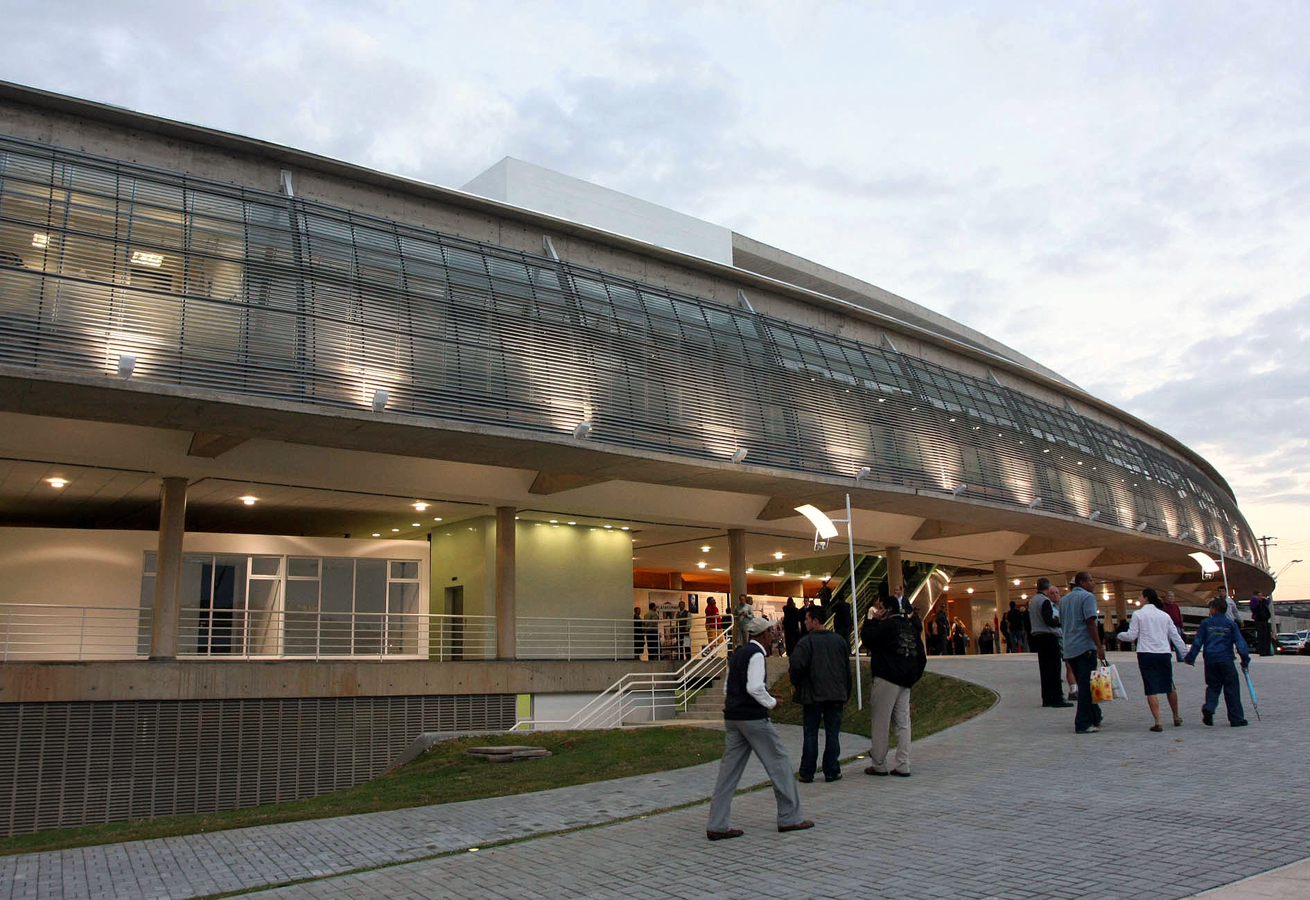 Rodoviária de Campinas